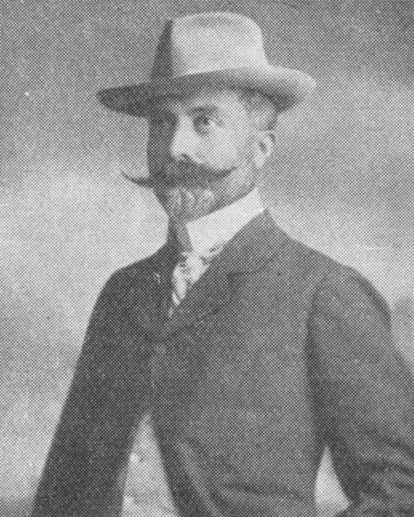 Tullio Sartori-Montecroce (1862-1905)